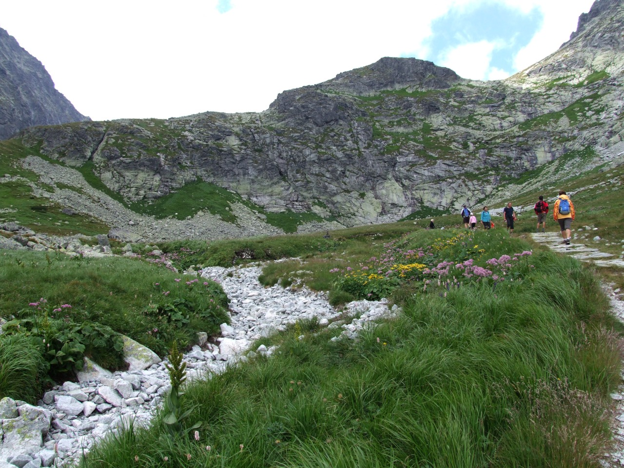 Wyzni Wielicki Ogród (Horná Kvetnica)